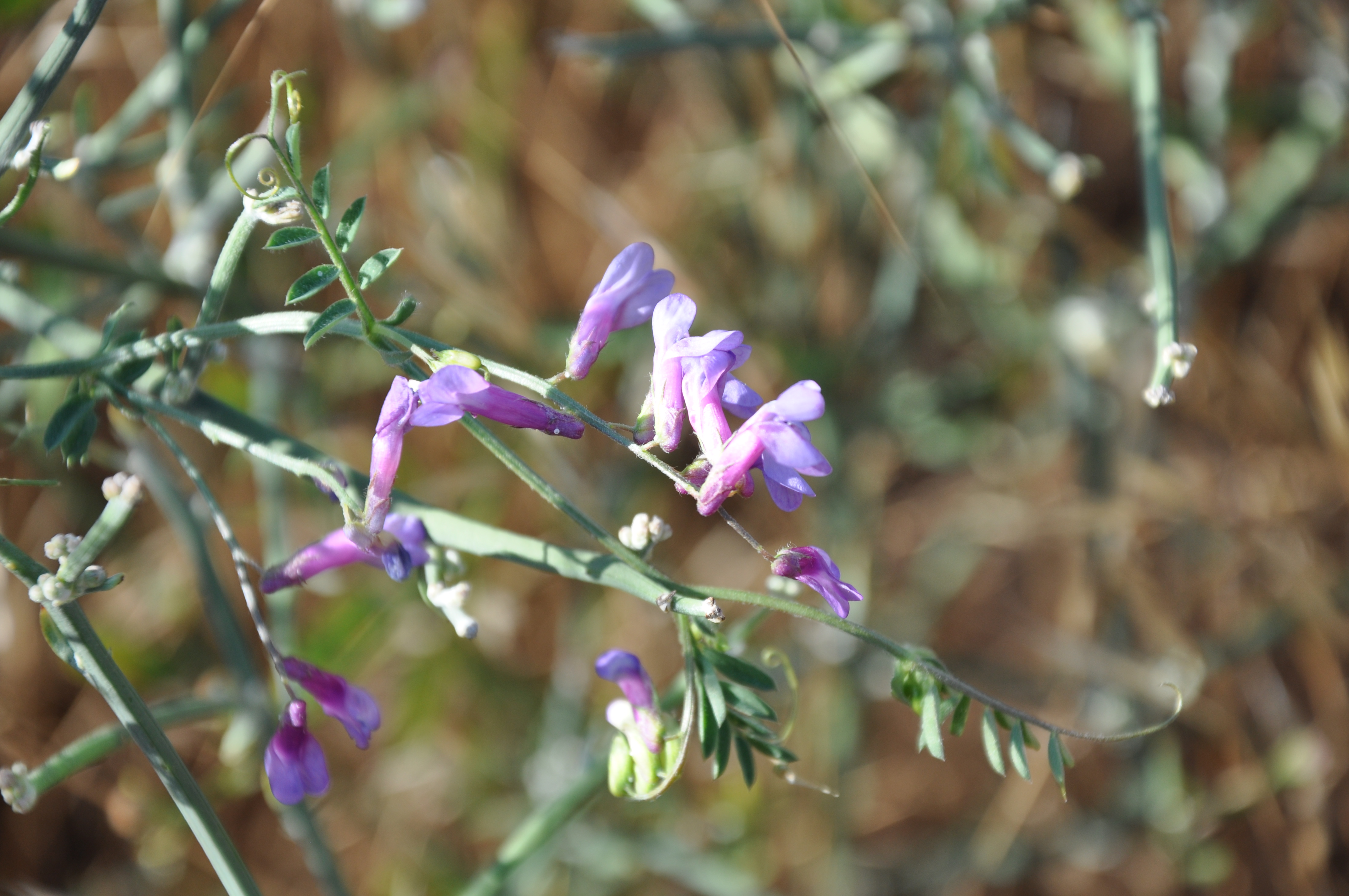 Arveja cana (Vicia onobrychioides), La Torre, Ávila, España.